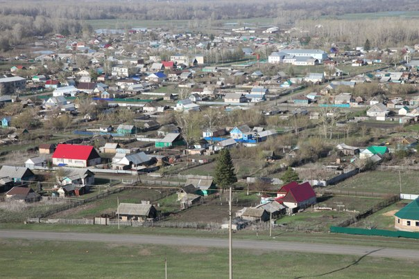 Башҡортса: Ейәнсура ауылы күренеше. Алыҫтағы планда - Һаҡмар йылғаһы.